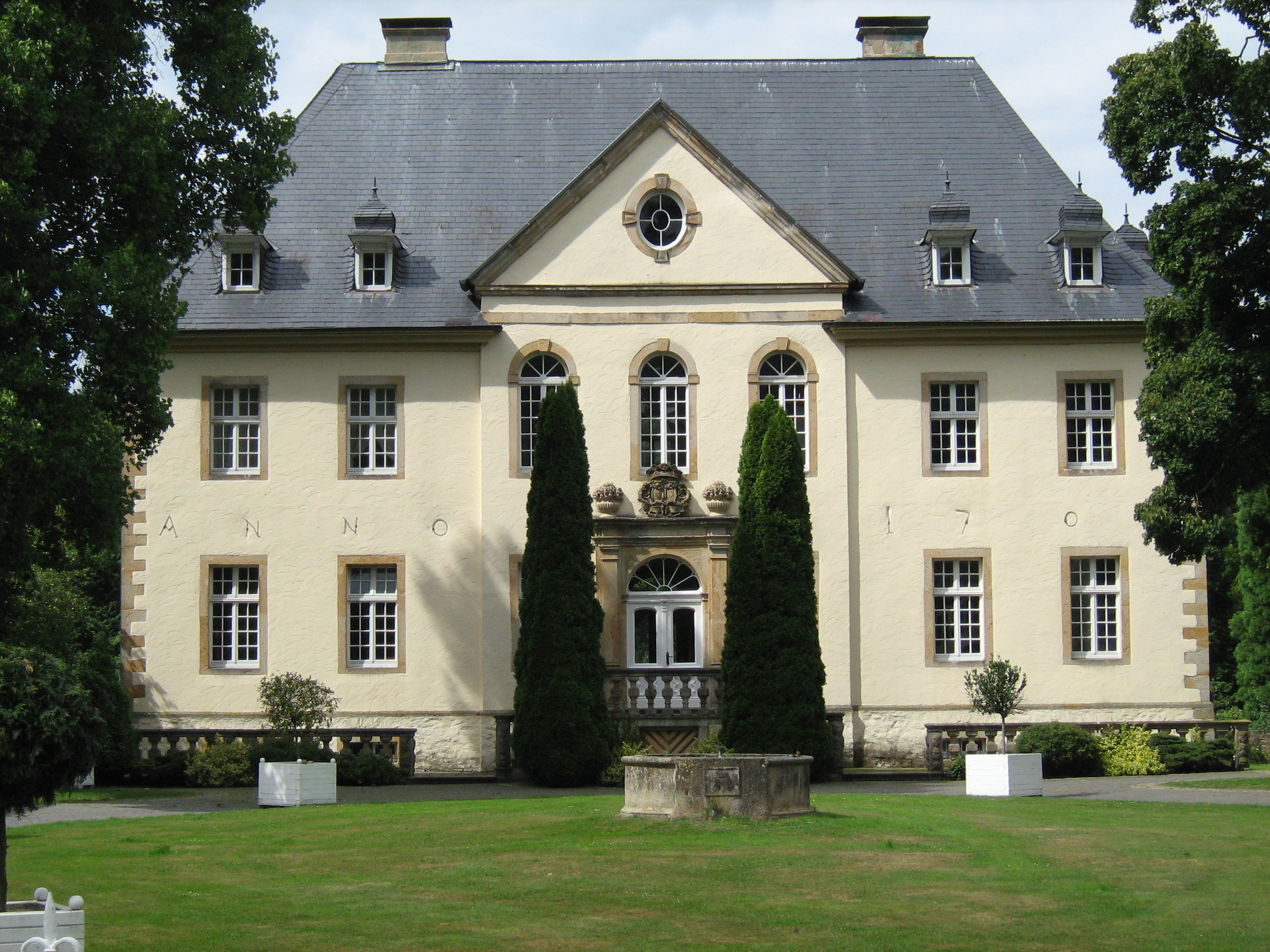 Herrenhaus Gut Leye in Atter bei Osnabrück